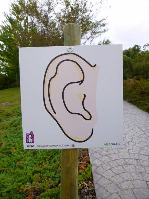 Parque de los Sentidos (Noáin, Navarra)